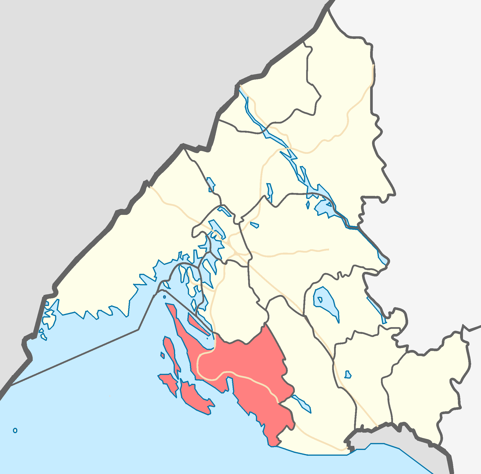 МО Приморское городское поселение на карте Выборгского района Ленинградской области